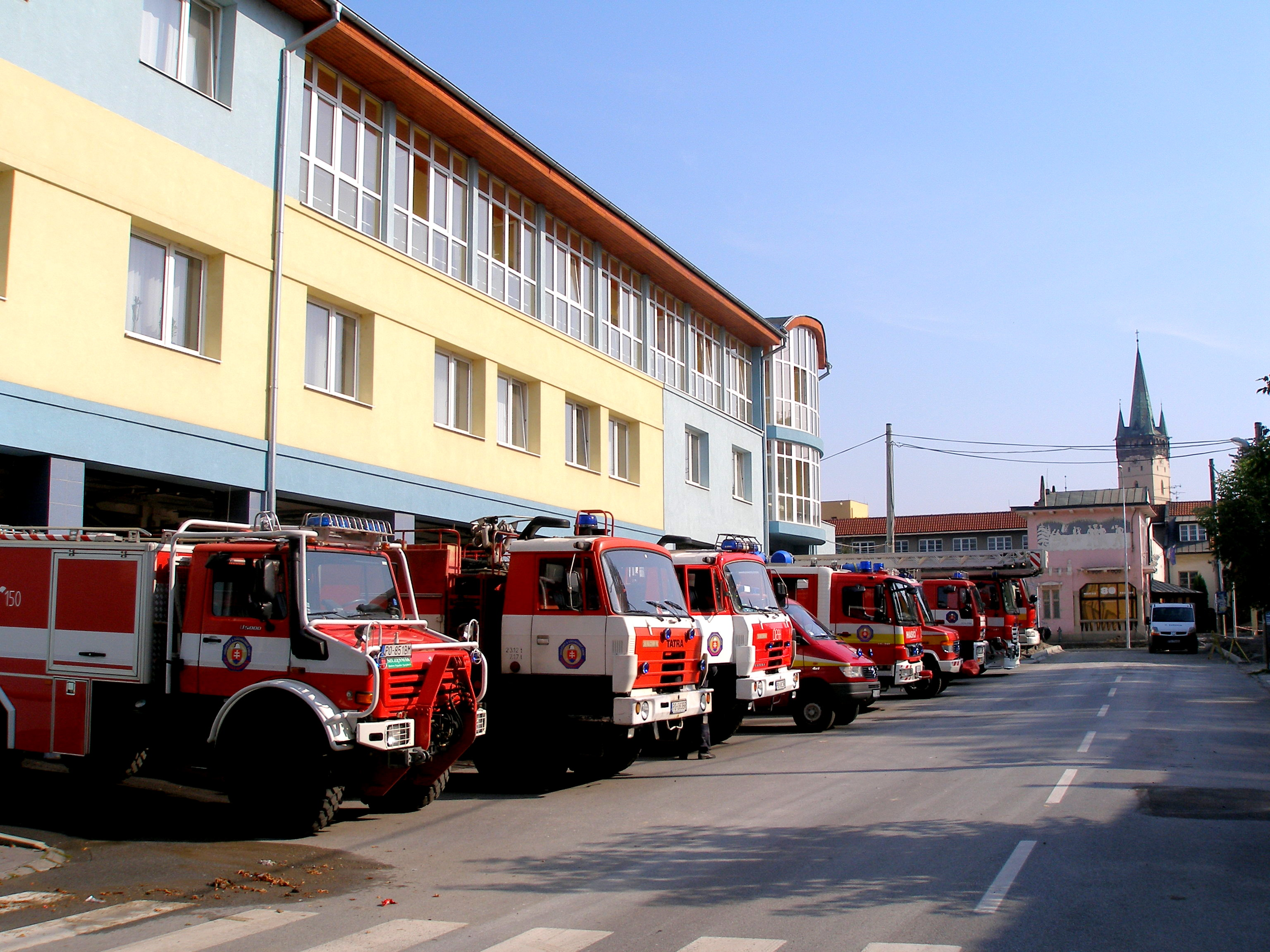 Ulica Požiarnická v Prešove.